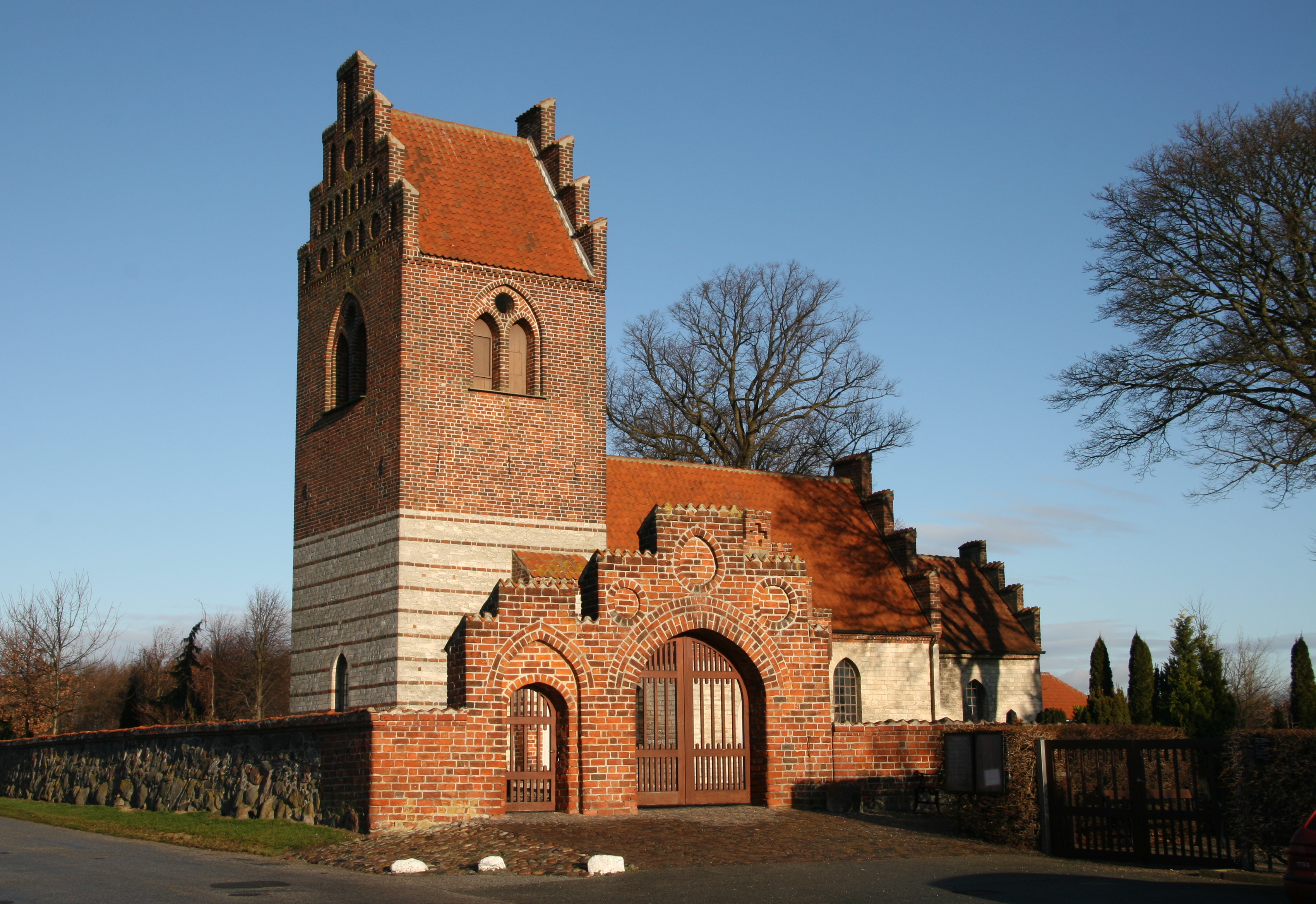 Vallensbæk Kirke, Vallensbæk, Denmark Vallensbæk Kirke from the road